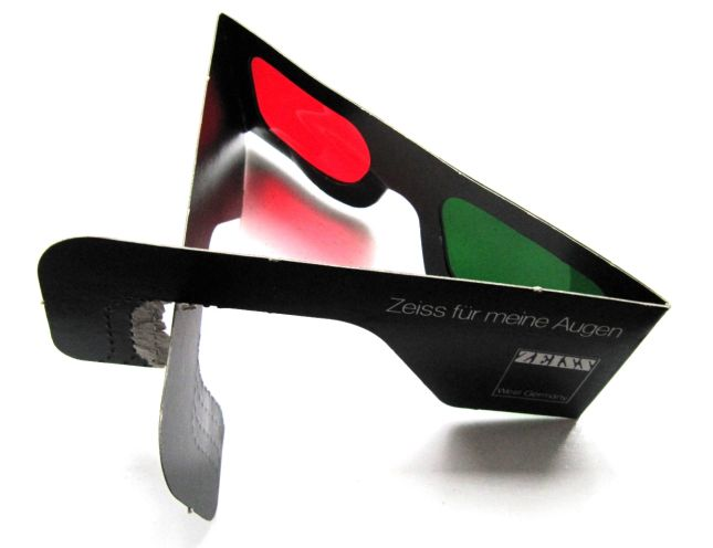 3D-Brille von Zeiss, West-Deutschland, 1978 für Versuchsfernsehen in 3D